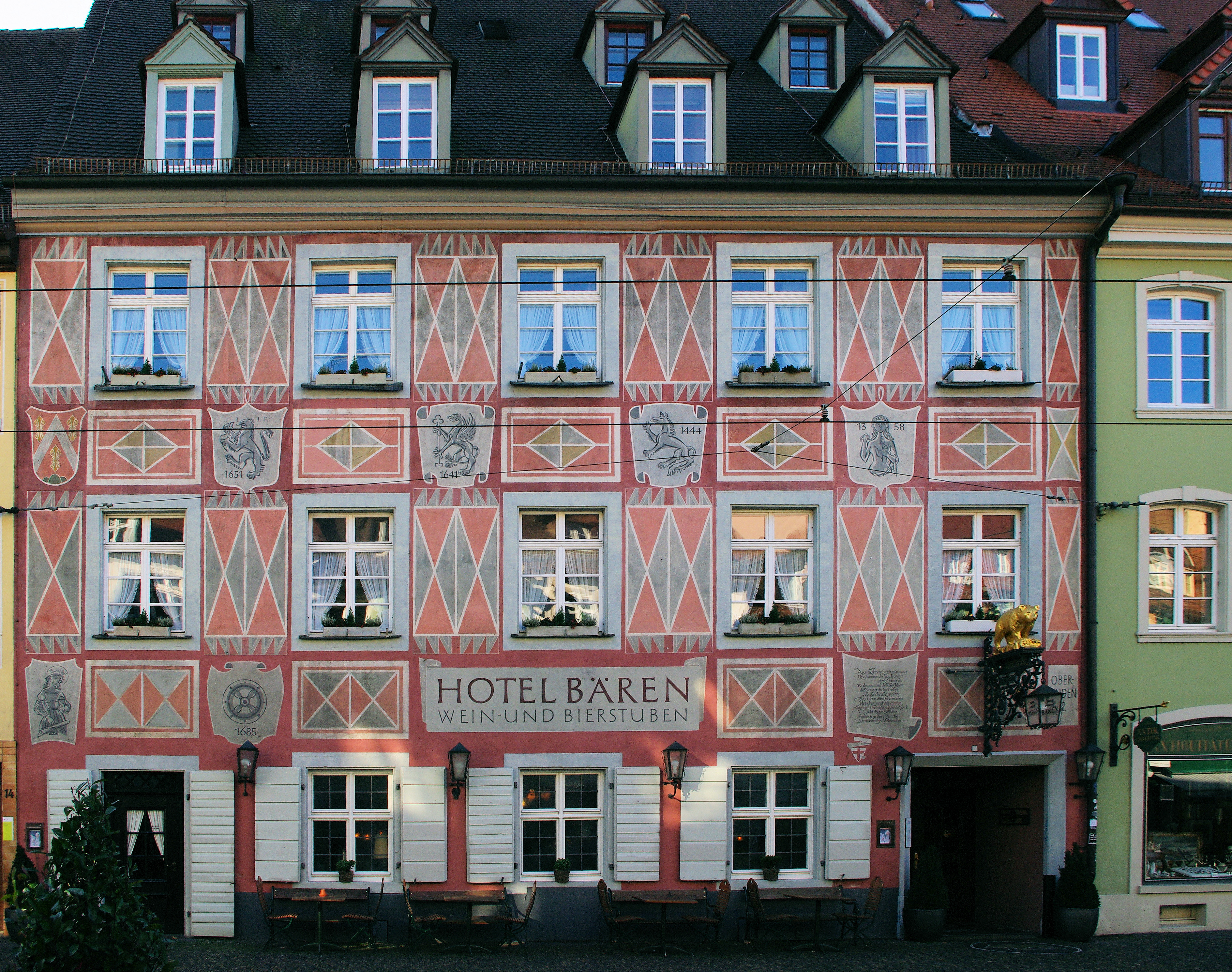 Hotel zum Bären ältestes Gasthaus Deutschlands Erste Fundamente nachgewiesen 1120